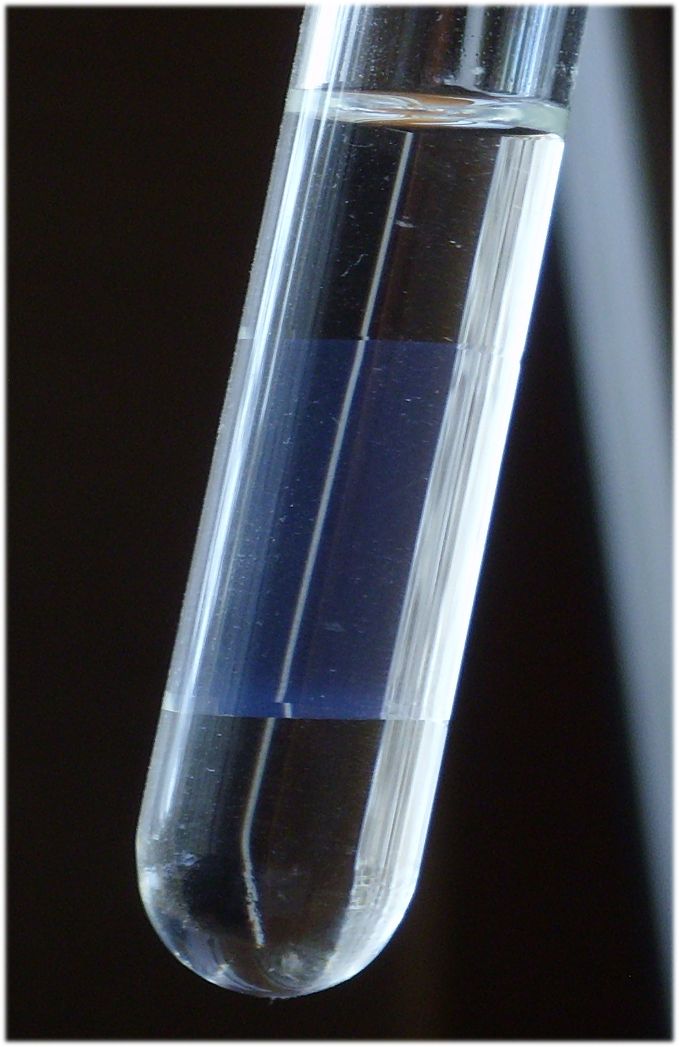 Opaleszierende Mikroemulsion (bläulich) samt wässriger und organischer Exzessphase. System Wasser-Decan-C8E3, alpha 50 %, gamma 10 %.